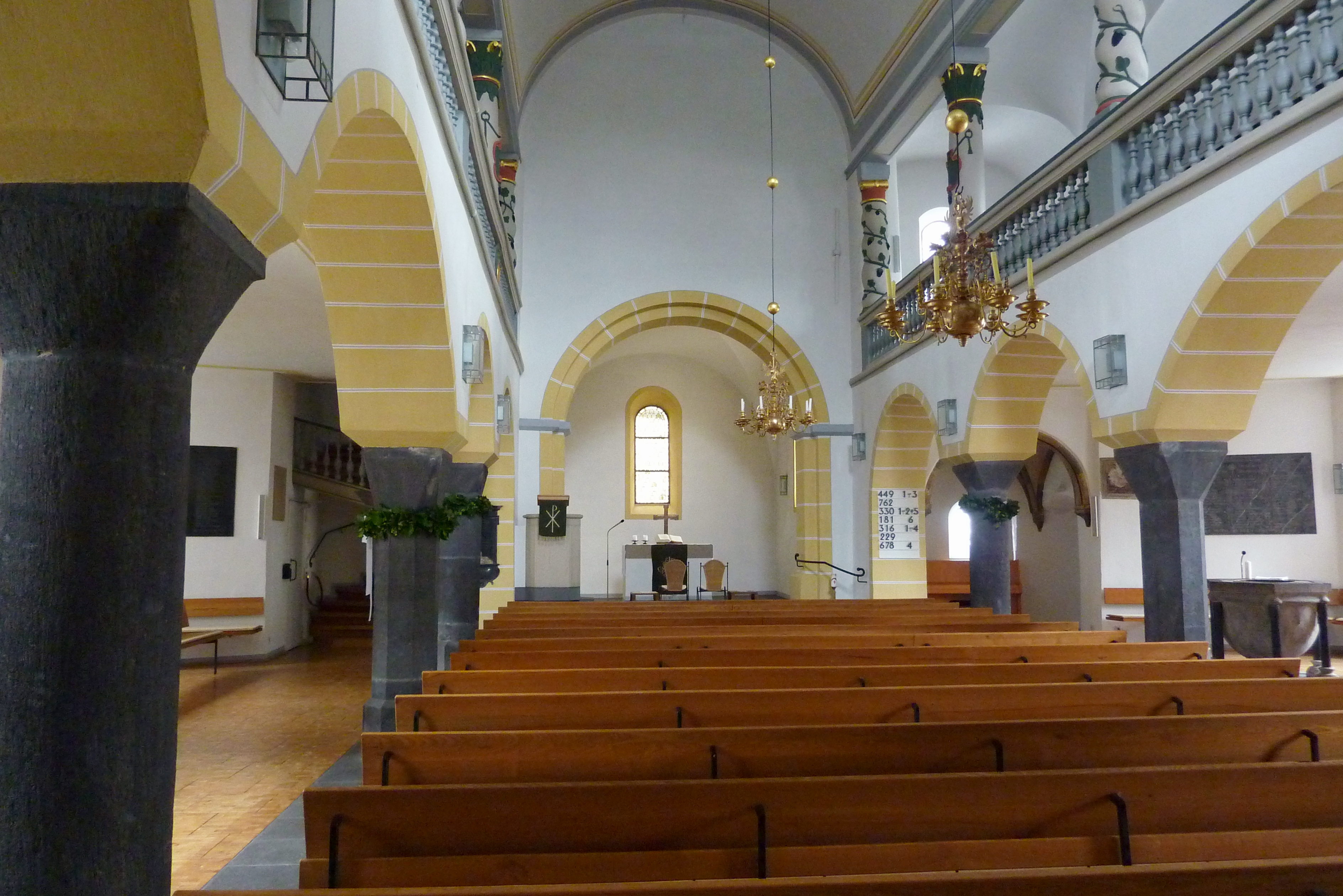 Evangelische Pfarrkirche in Winningen im Landkreis Mayen-Koblenz (Rheinland-Pfalz), Innenraum, Blick zum Chor